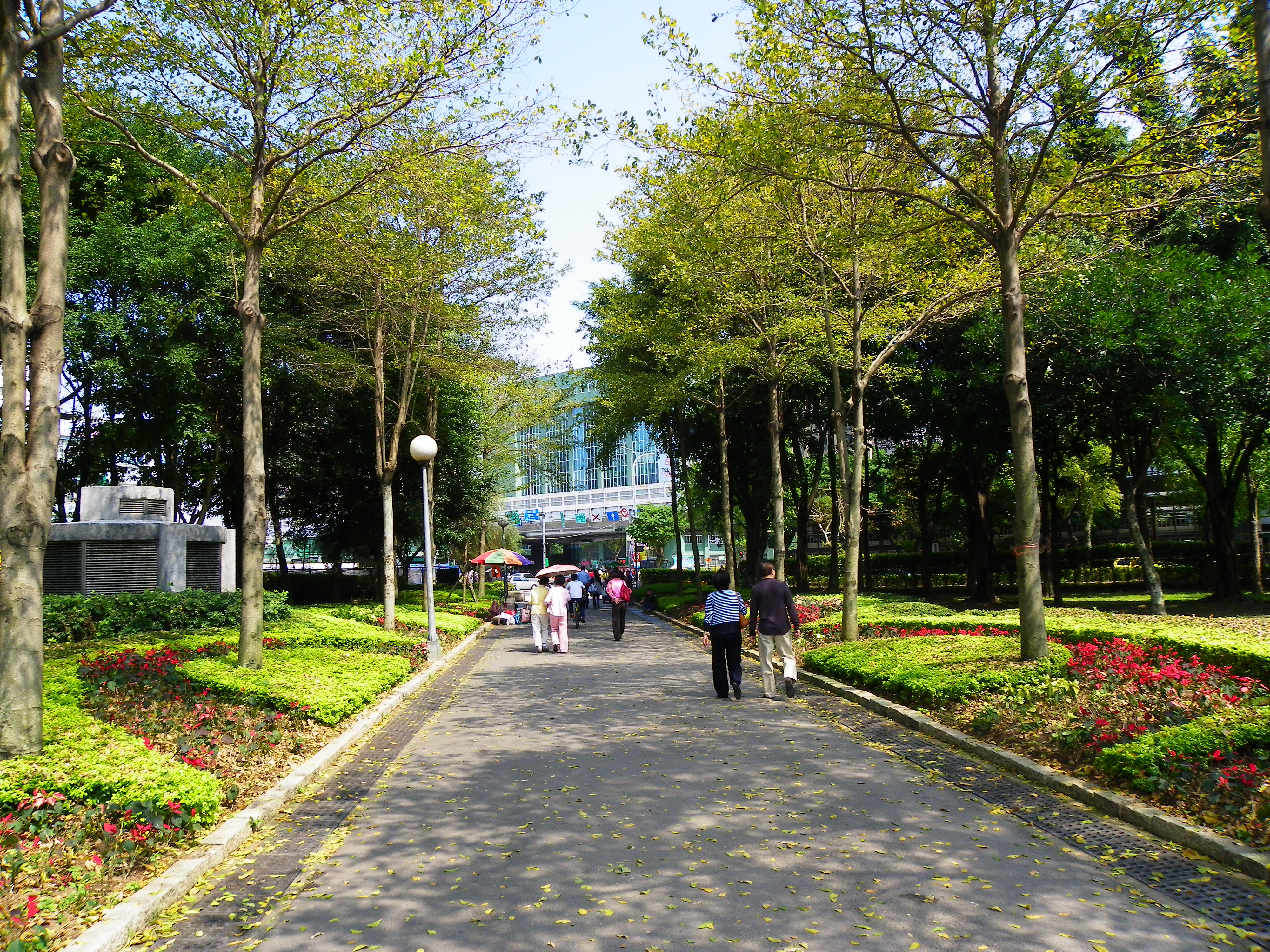 臺北市大安森林公園東北口，背景是建國南路高架橋與大安郵局。